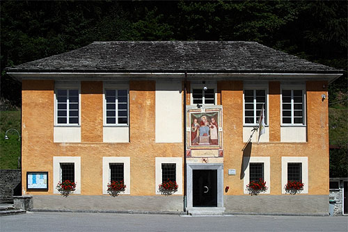 Municipio (Gemeindehaus) di Brione